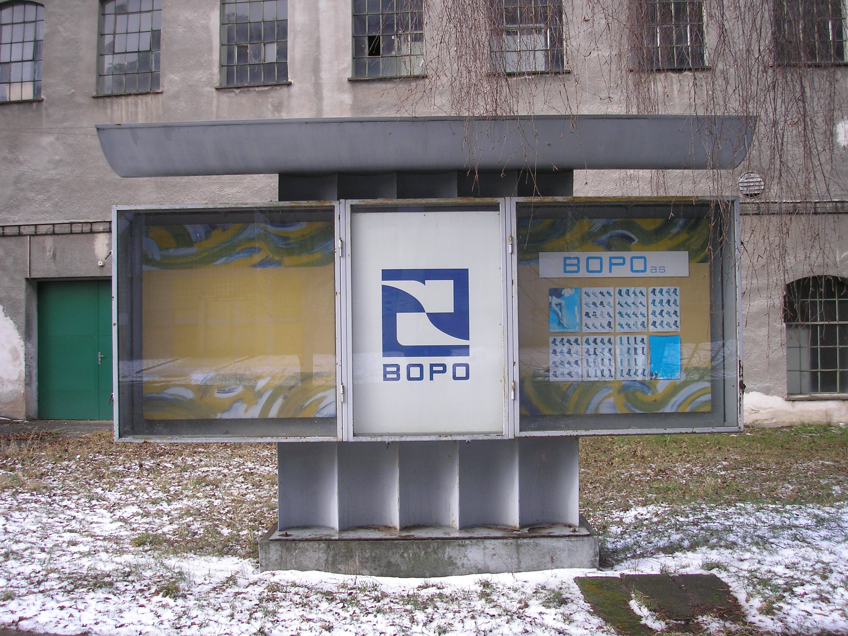 Nástěnka v areálu bývalé společnosti BOPO s jejím logem a katalogem sortimentu.